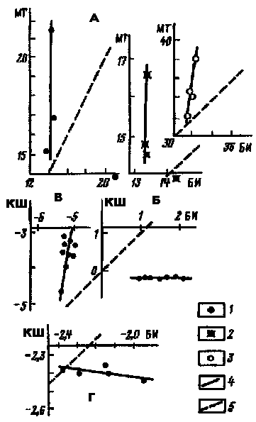 Рис.2.Распределение отношений концентраций радиогенных изотопов и изобаров между минералами.Изотопные системы:А-распределение отношений содержаний изоторов свинца в минералах гнейсов Гренландии (Х.Баадсгаард и др.,1976;зависимости 1-206Pb/204Pb; 2-207Pb/204Pb;3-208Pb/204Pb.4-наблюдённые прямые,5-предполагвемые исходя из одновозрастности свинцов.Б-ln(87Sr/86Sr) в гранитах (Ц. Брукс,1966). Изобарные системы:В-ln(87Sr/87Rb) в гранитах (Ц.Брукс, 1966).В-ln(40Ar/40K) в гранитоидах и гнейсах (Л.Т. Олдрих и др.1965).